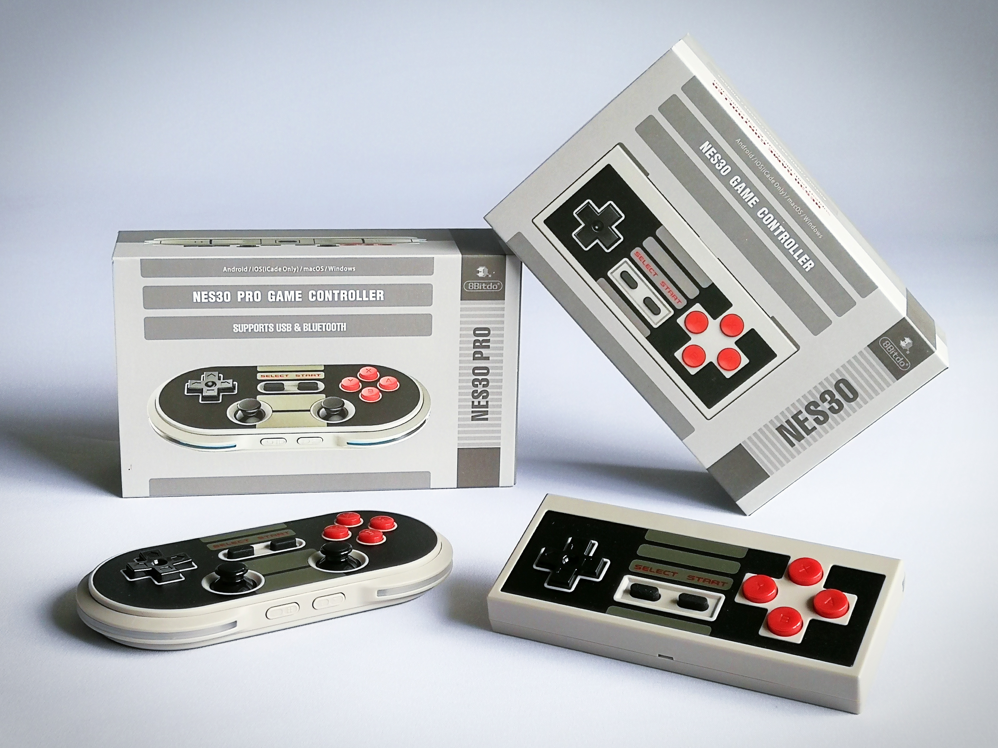 Trådlösa spelkontroller av fabrikat 8Bitdo NES30 och NES30 Pro med design hämtad från Nintendos klassiska NES spelkontroll. Fungerar bland annat tillsammans med Android, Windows och macOS. Anslutningen sker trådlöst med bluetooth eller med kabel via micro-USB. Strömförsörjning sker via ett inbyggt laddningsbart batteri.